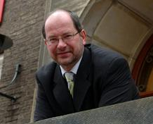 Karel Loohuis, burgemeester van Hoogeveen. PvdA.